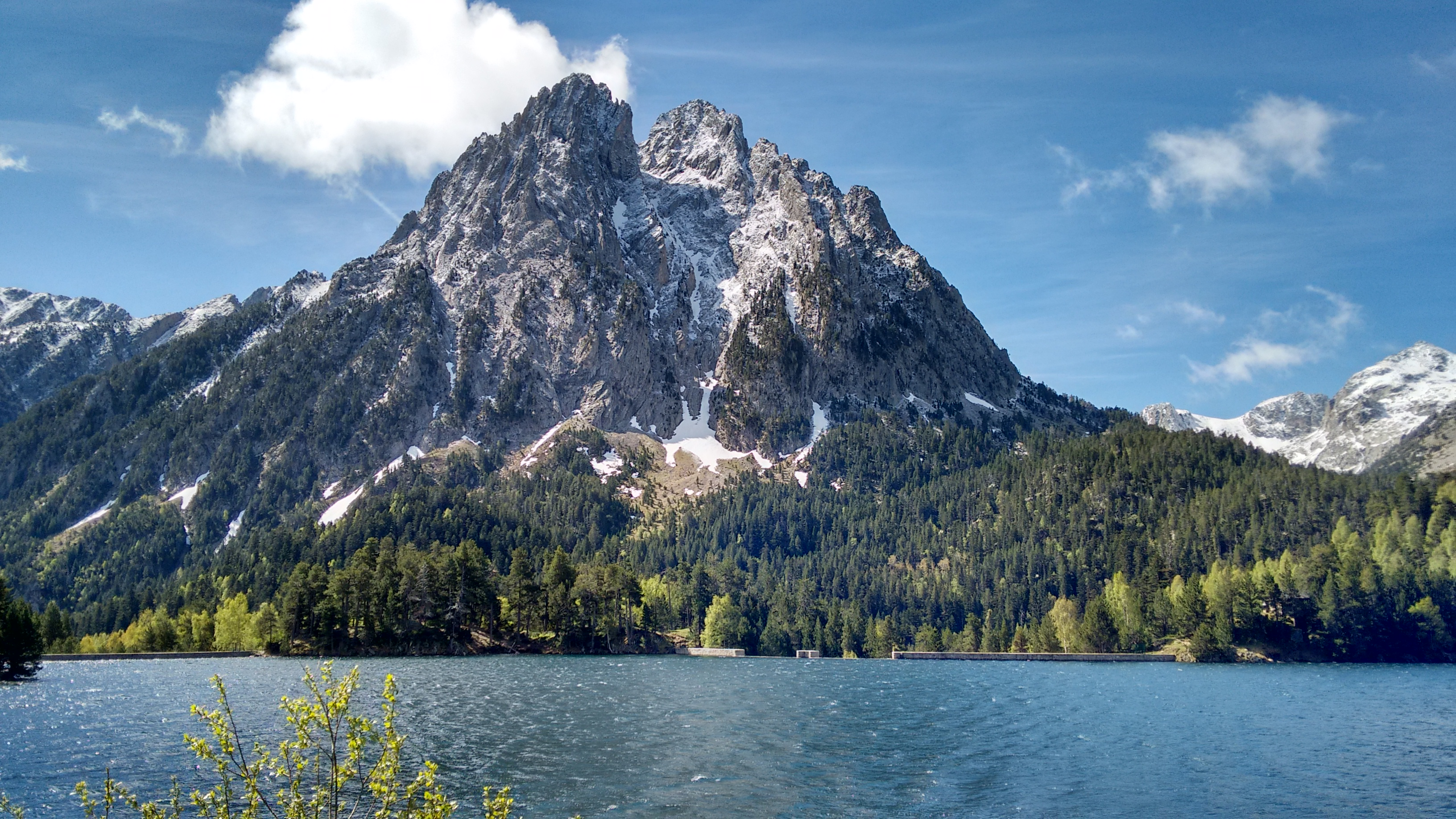 Vista de la montaña de Els Encantats y del lago de Sant Maurici, en el Parque Nacional de Aigüestortes i Estany de Sant Maurici. This is a photography of a Site of Community Importance in Spain with the ID: ES0000022. Natura2000 entry, EEA entry